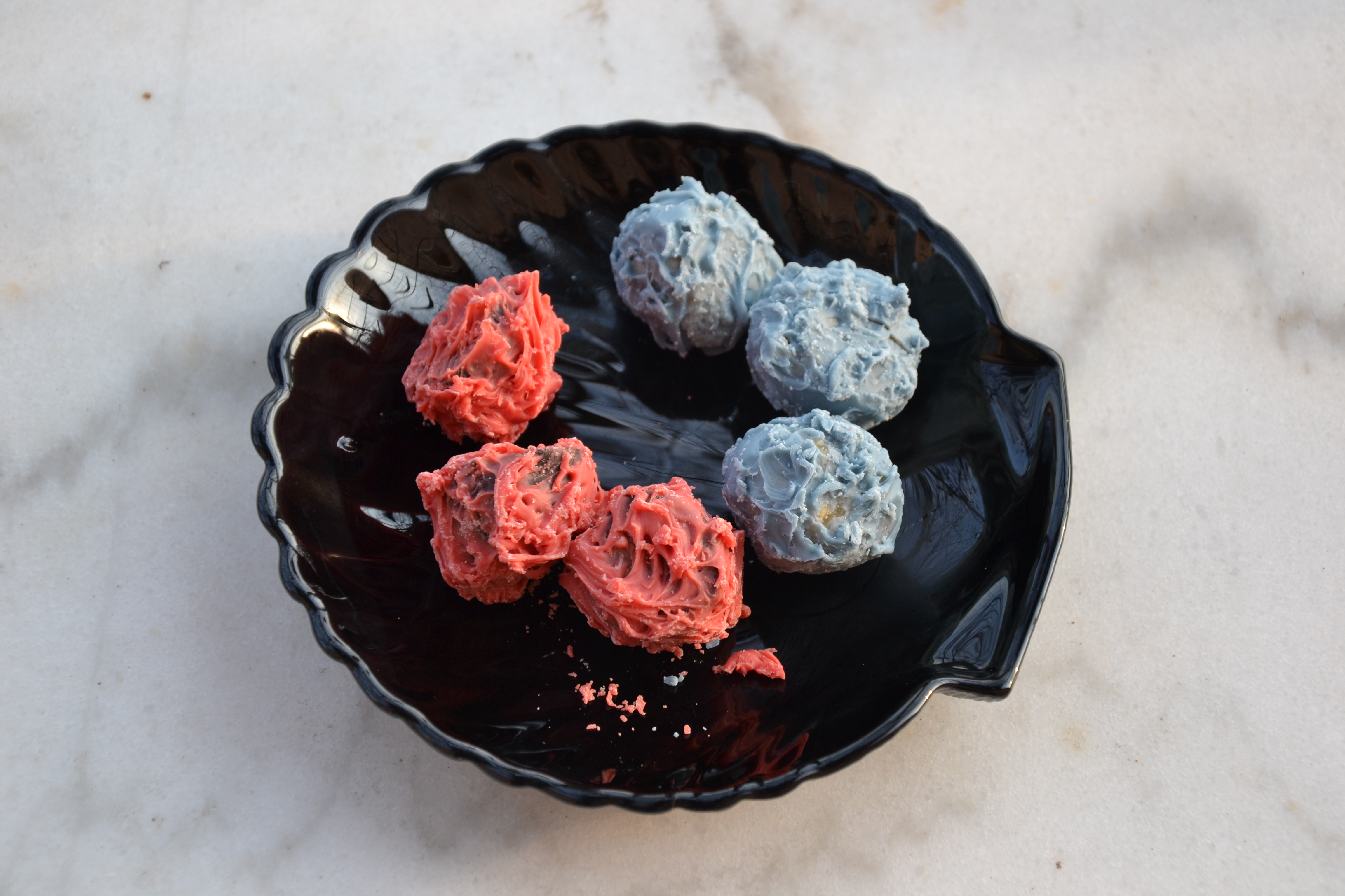 confiseries de Vaucluse : Papalines d'Avignon et Chardons du Ventoux